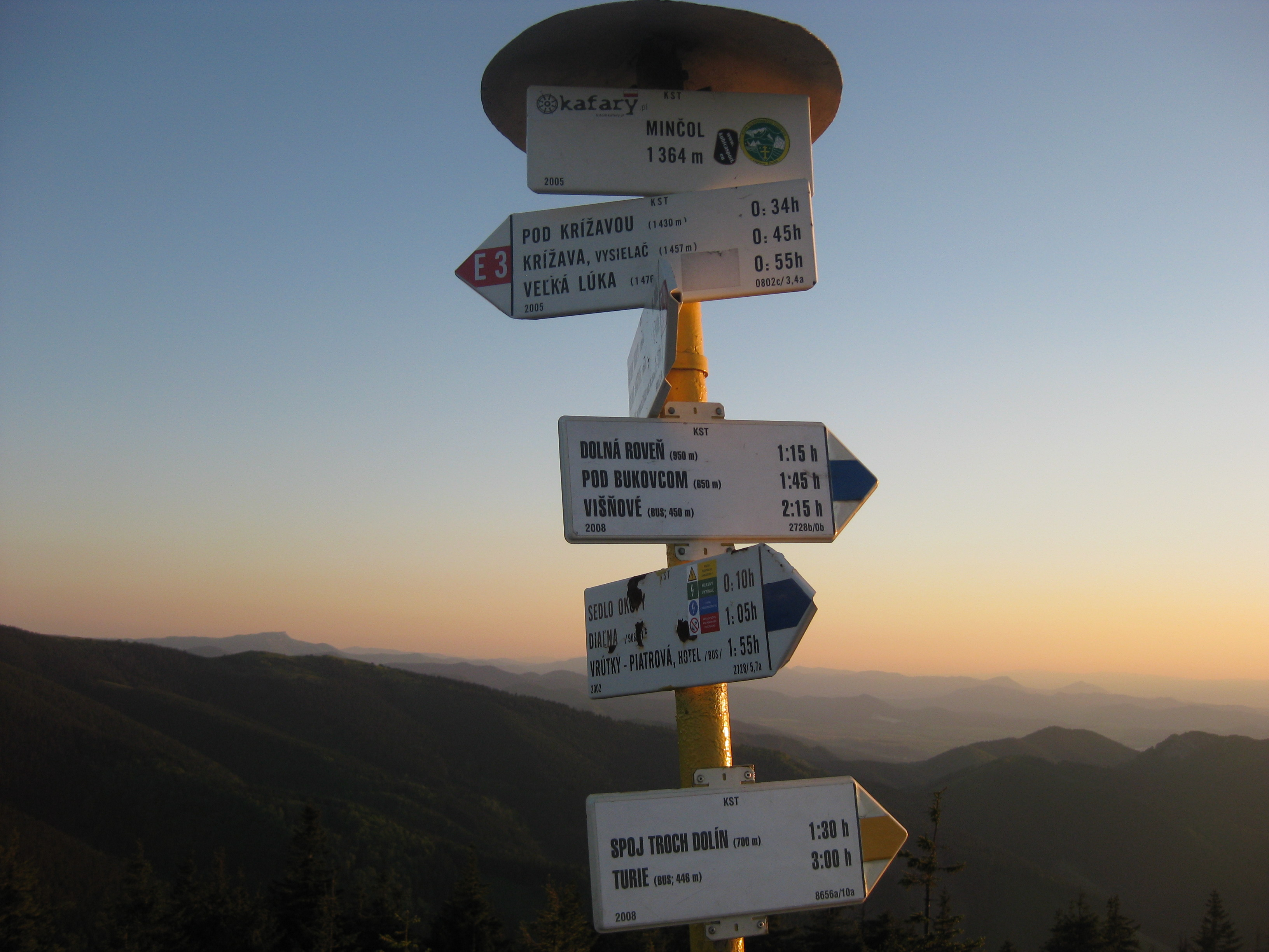 Vrchol Mincola detail značkoveho stlpika